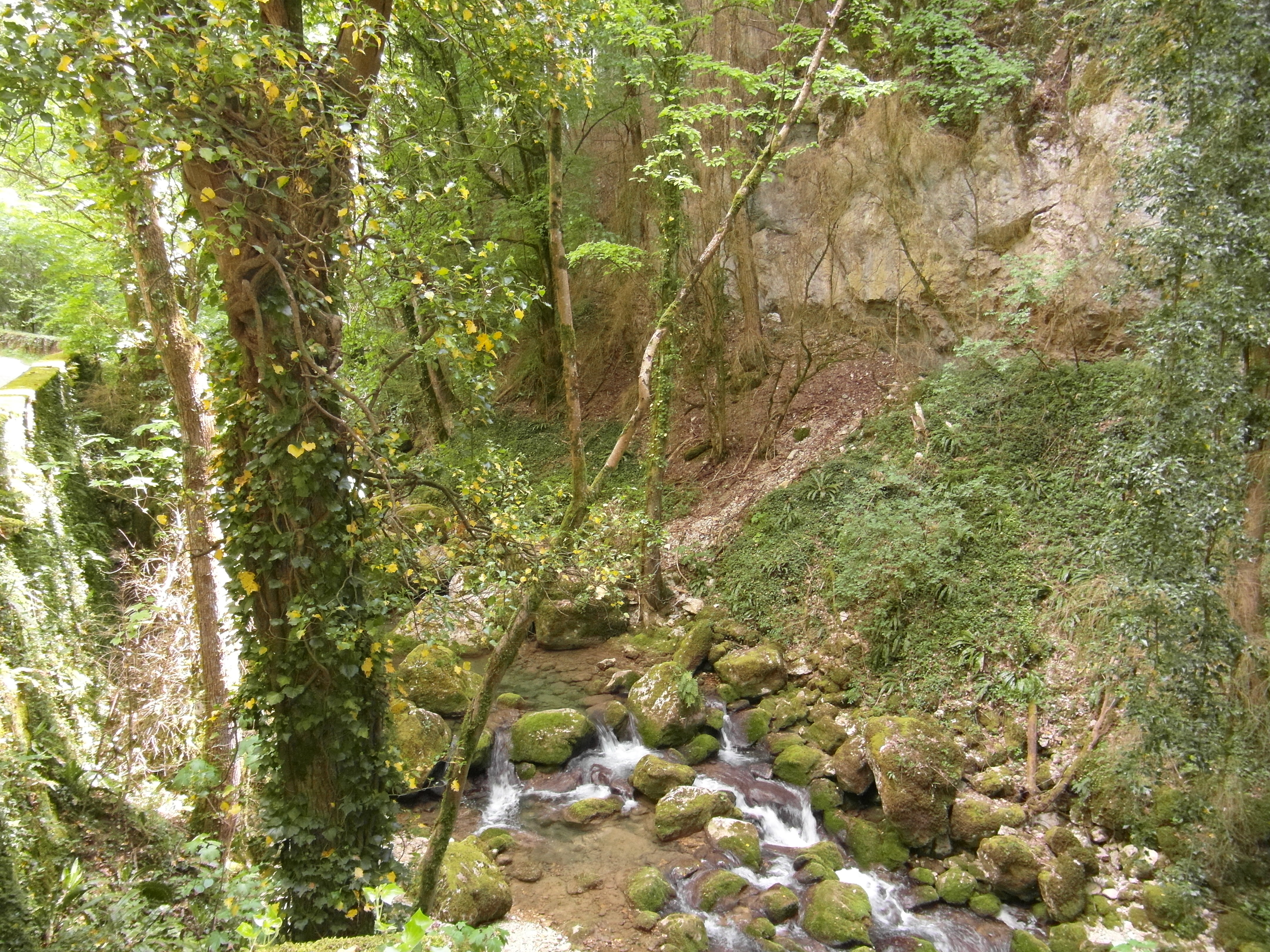 le Nan à Cognin les gorges